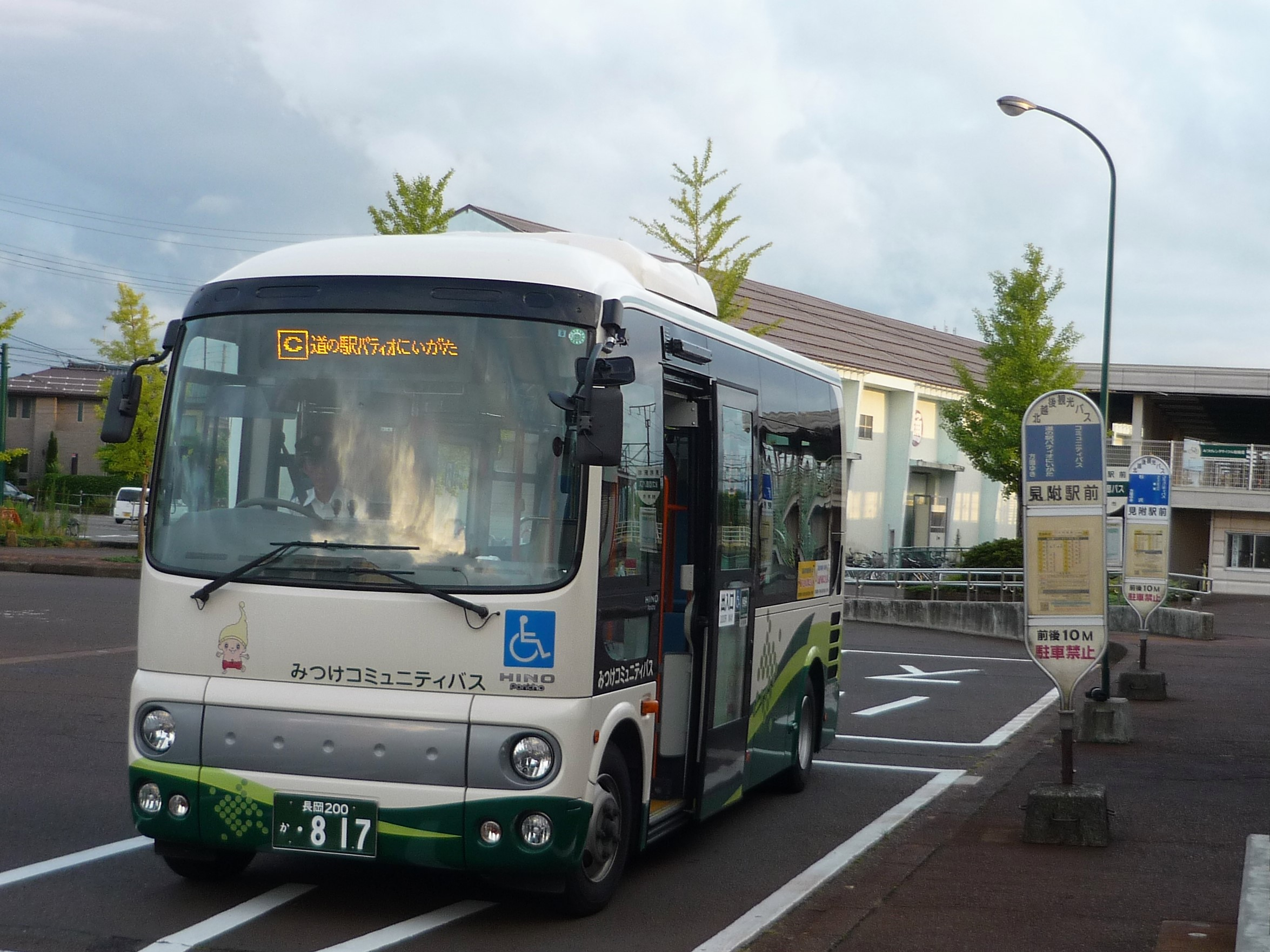 見附駅前に停車中の見附市コミュニティバス